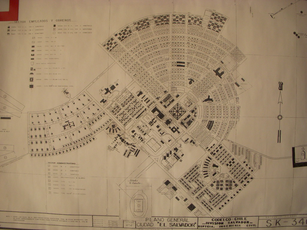 Plano de la ciudad de El Salvador, Atacama, Chile